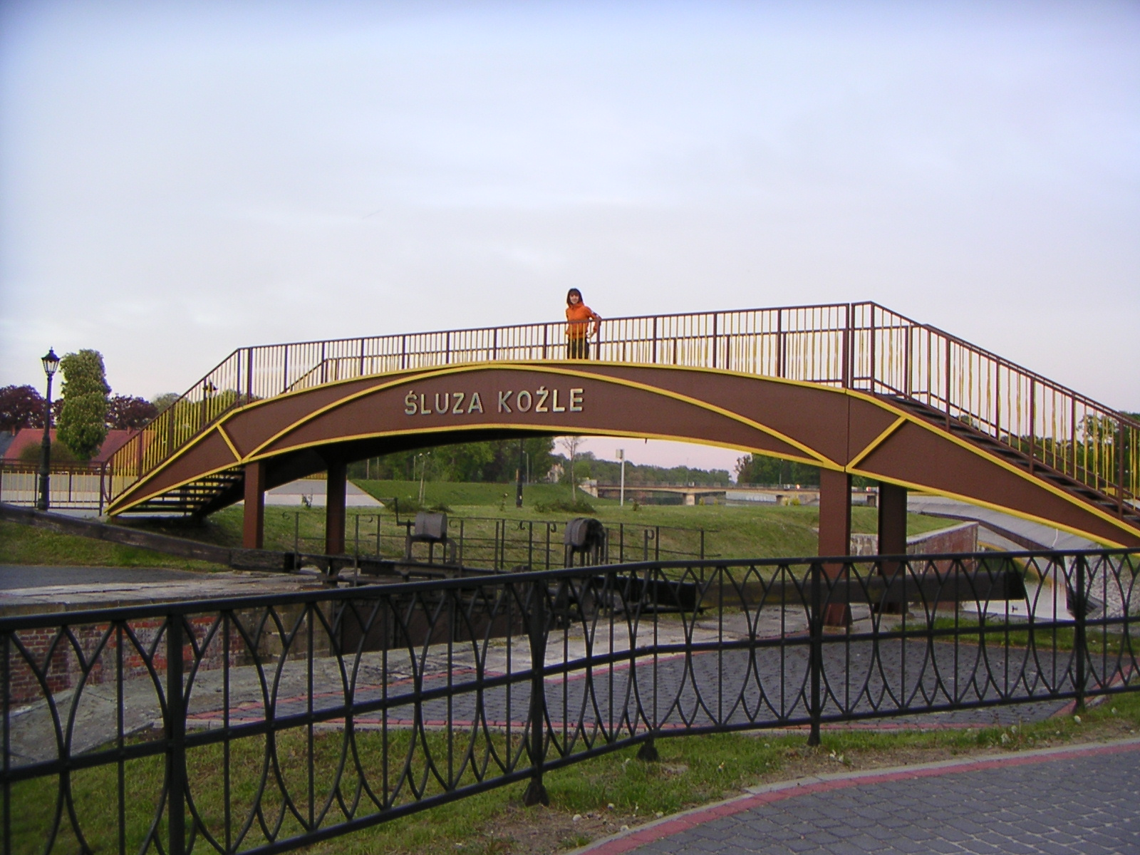 Śluza w Kędzierzynie-Koźlu Autorem zdjęcia jest Skok.